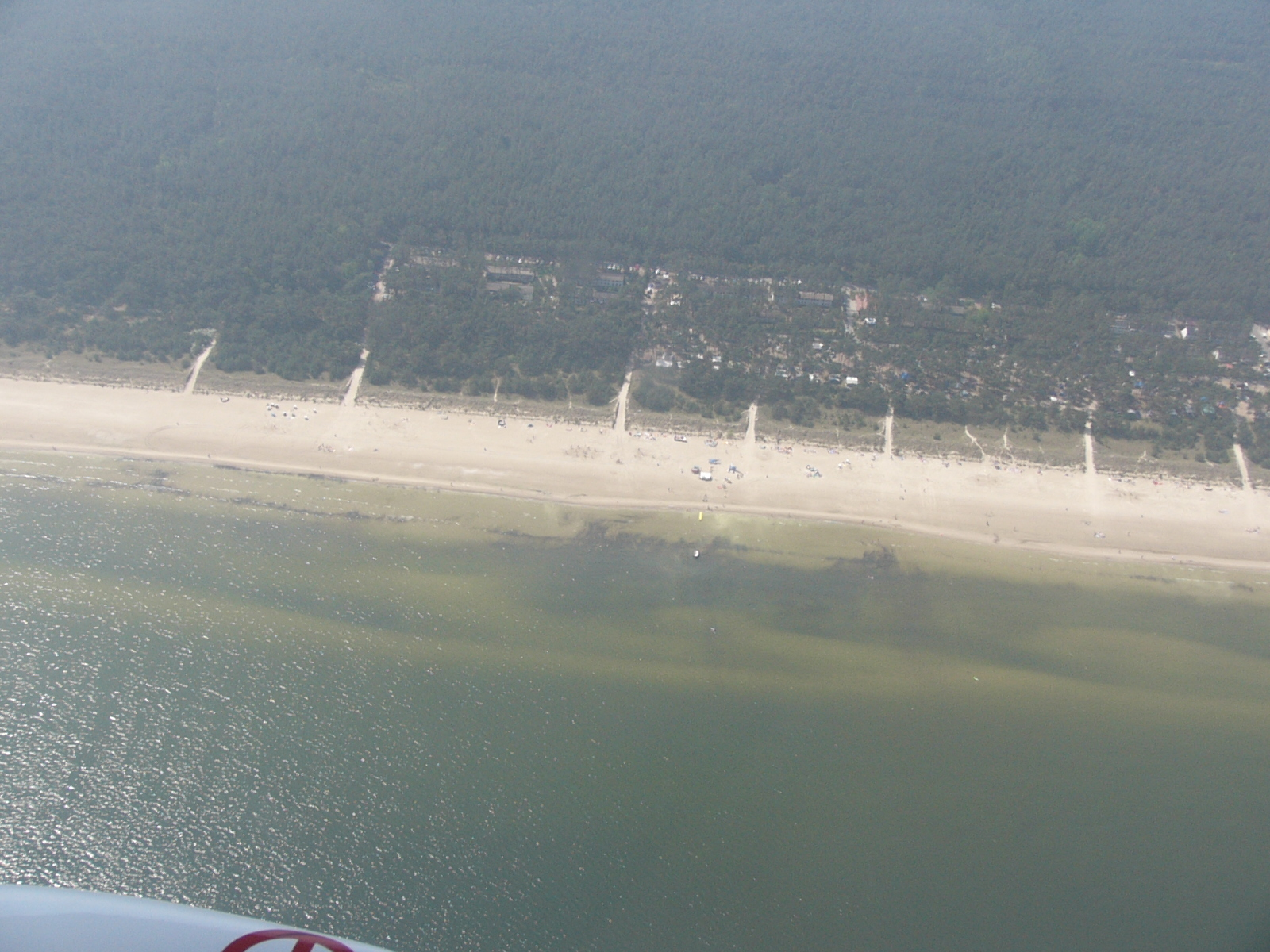 Zeltplatzstraße 30, 17449 Karlshagen, Germany